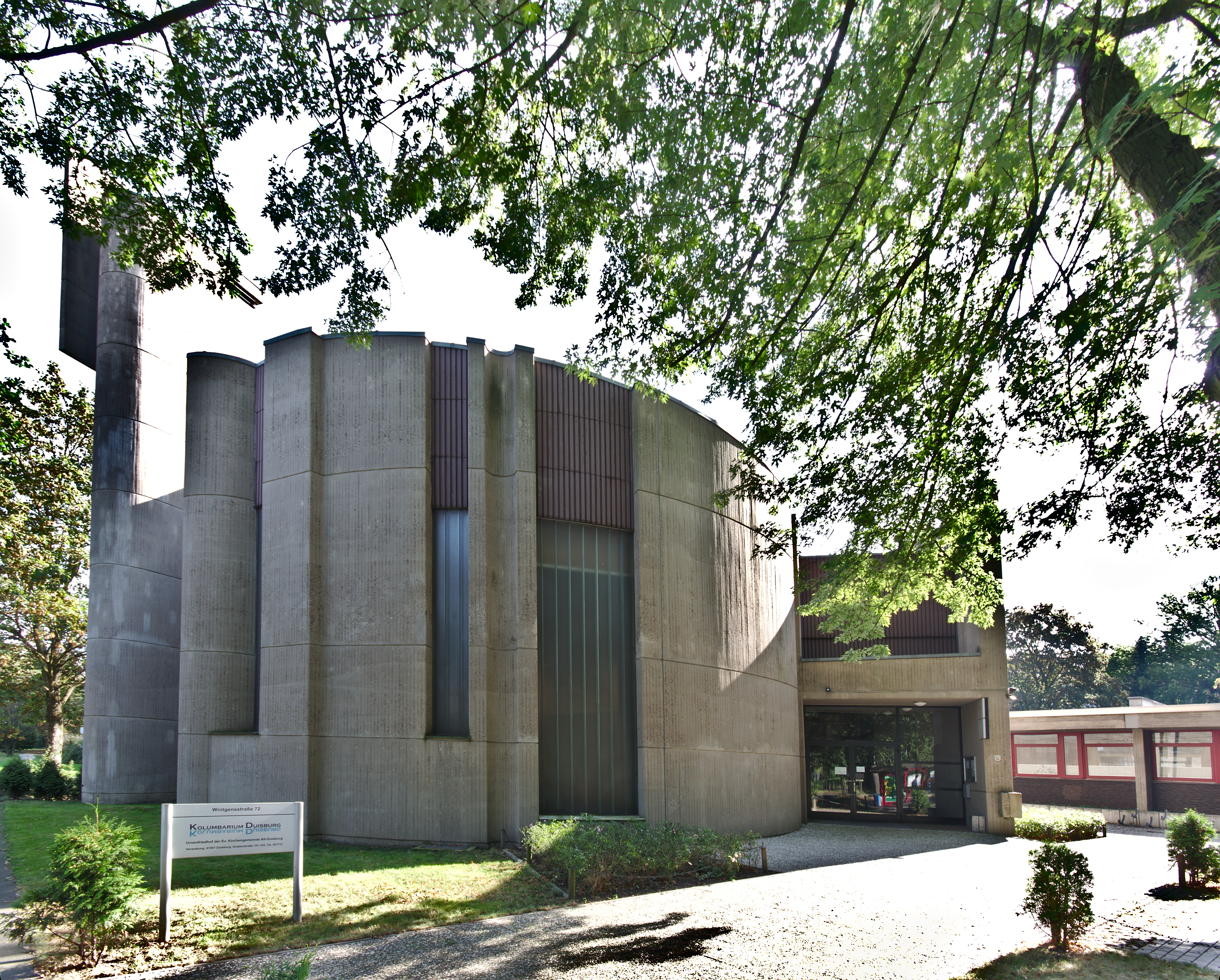 Bis 2004 evangelische Kirche von Duissern, seit 2012 genutzt als KolumbariumThis is a photograph of an architectural monument., no. 583